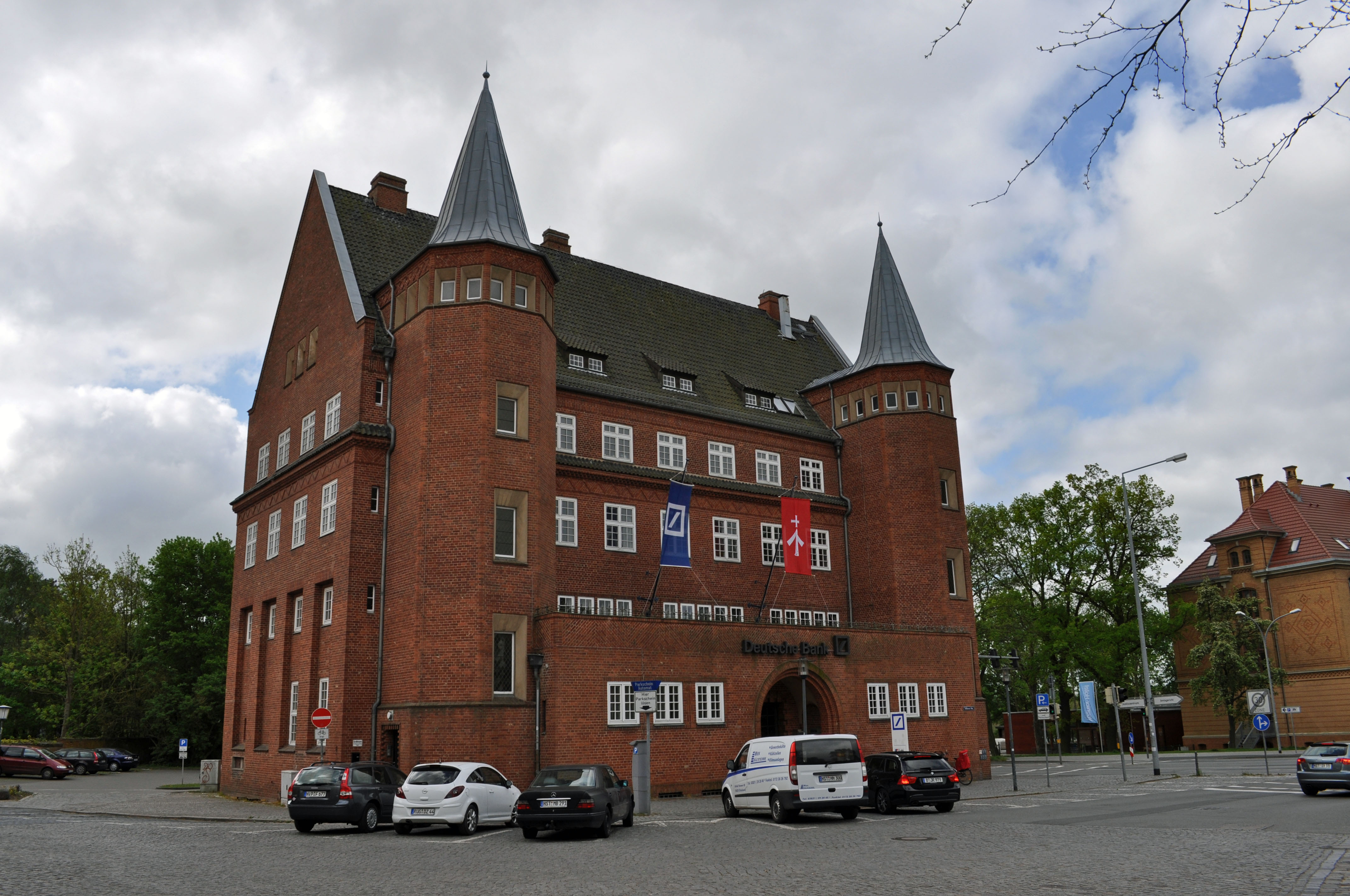 Gebäude in Stralsund, siehe Dateiname